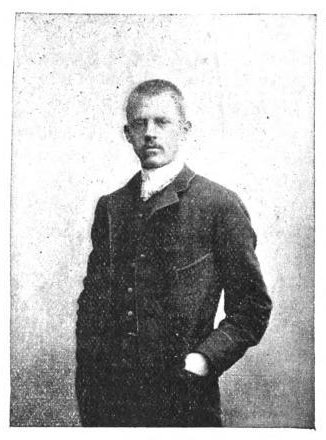 Porträtt Gabriel Finne